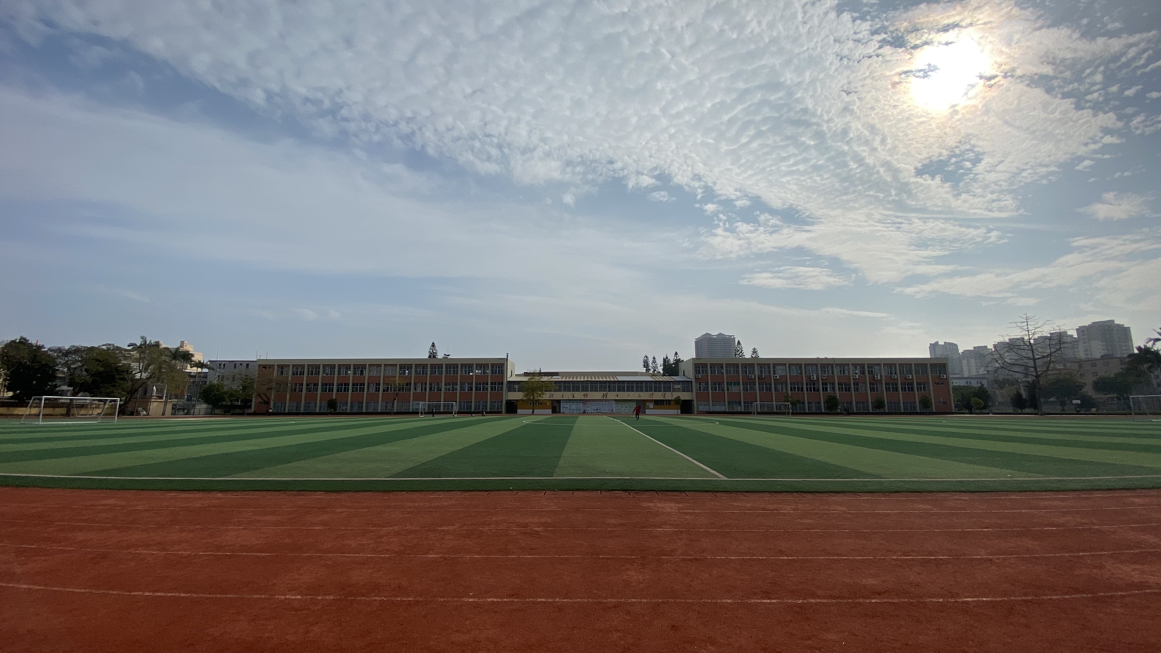 中文（香港）: 林启恩纪念中学后操场一景